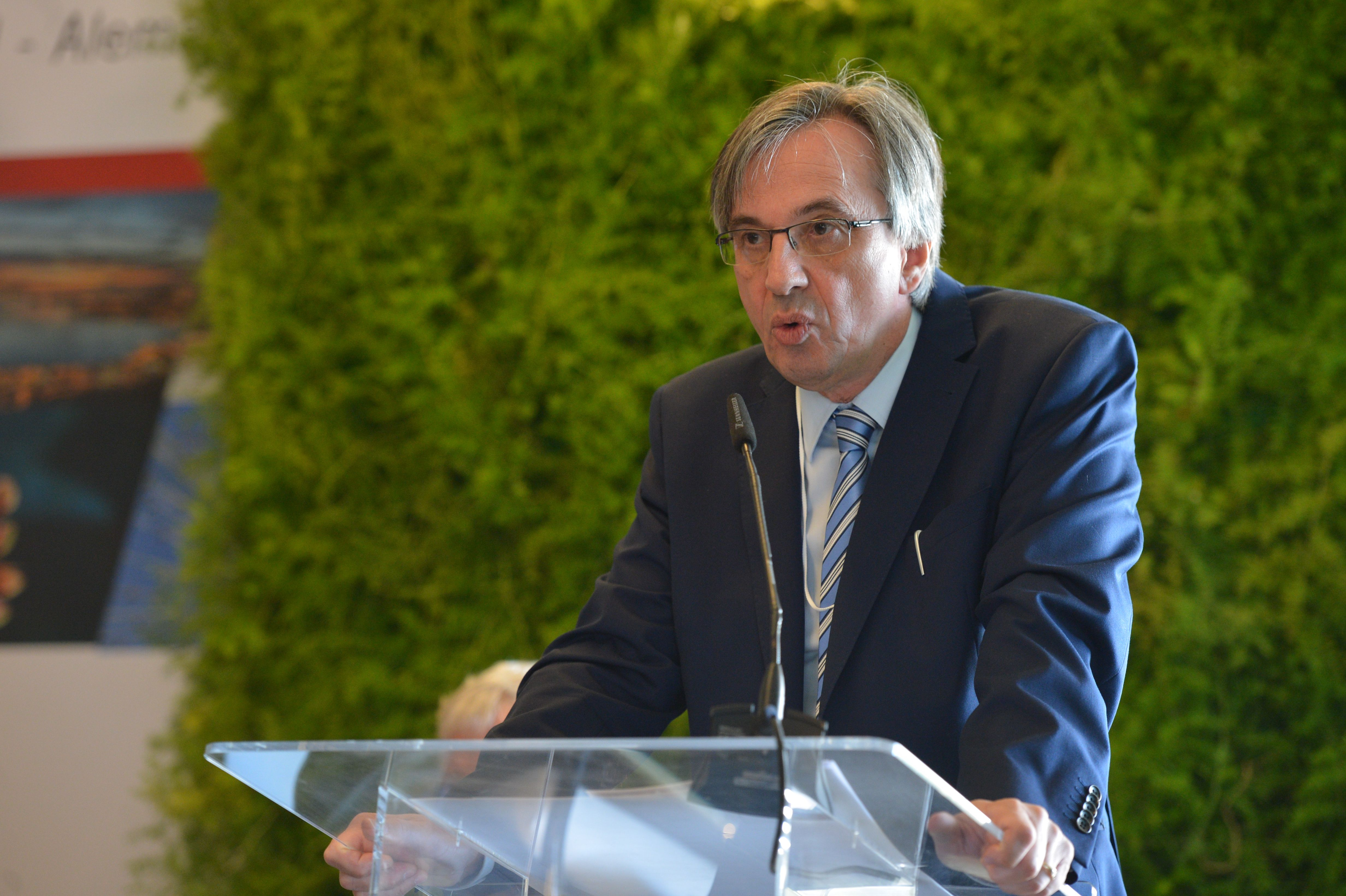 Der Deutsche Botschafter in Brasilien, Dirk Brengelmann.